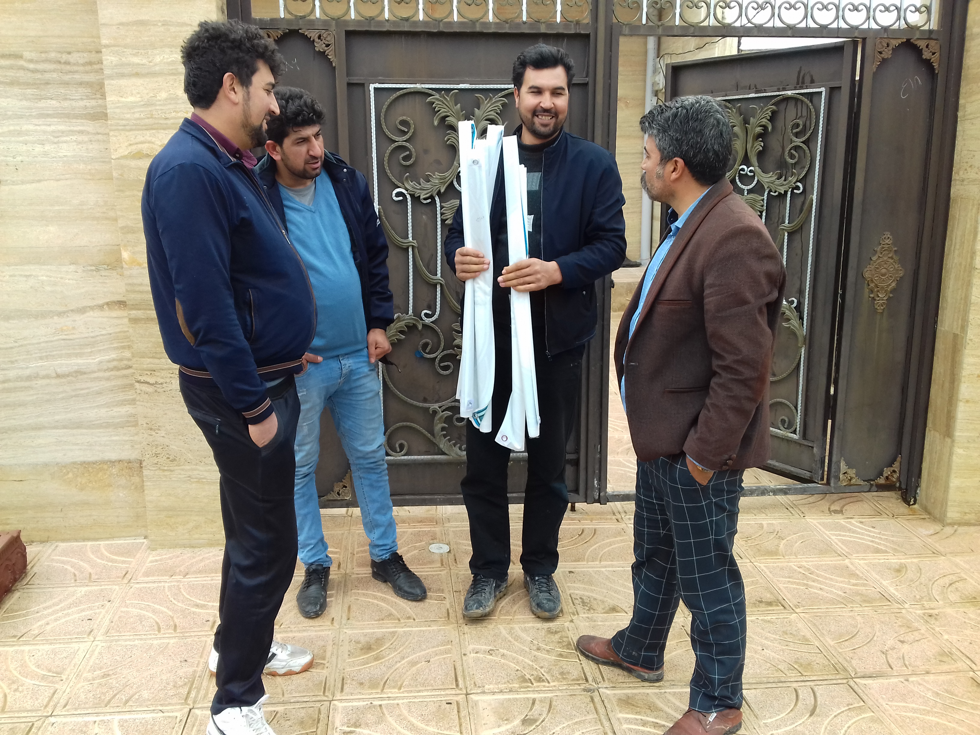 بازید میدانی دهیار و شورای محترم از محیط روستا